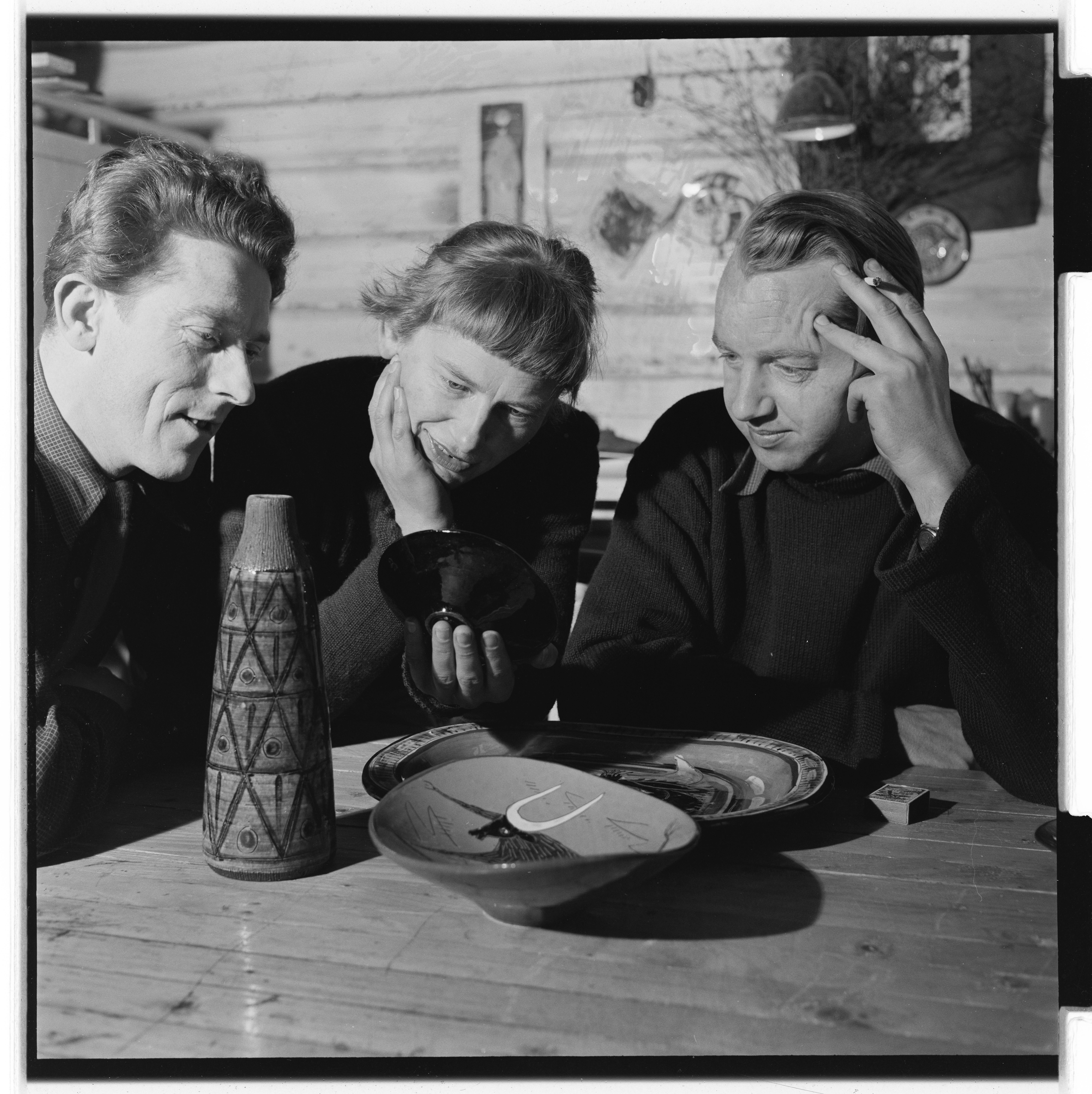 Bildet er hentet fra Arkivverket. Kongsberg keramikkfabrikk. Etablert i 1947 av Rolf Hansen, Sven Skjæveland og Birgitte Carlsen. Arkivinstitusjon : Riksarkivet Arkivnavn : Billedbladet NÅ Sted : Norge, Buskerud, Kongsberg, Emneord: Kunsthåndverk, Brukskunst, Keramikk, Kvinner, Menn Avbildet